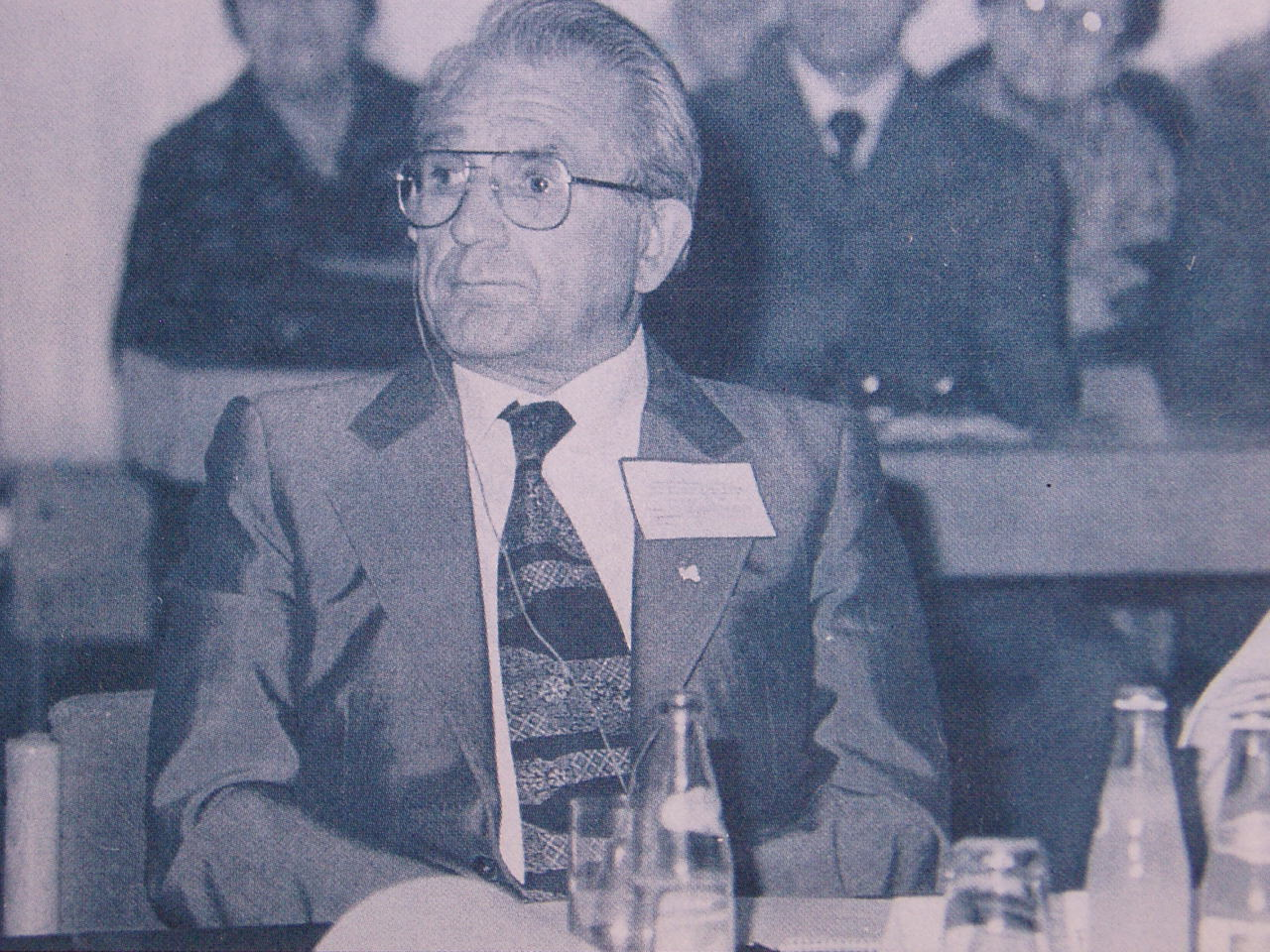 Lorenz Knorr bei einer wissenschaftlichen Konferenz